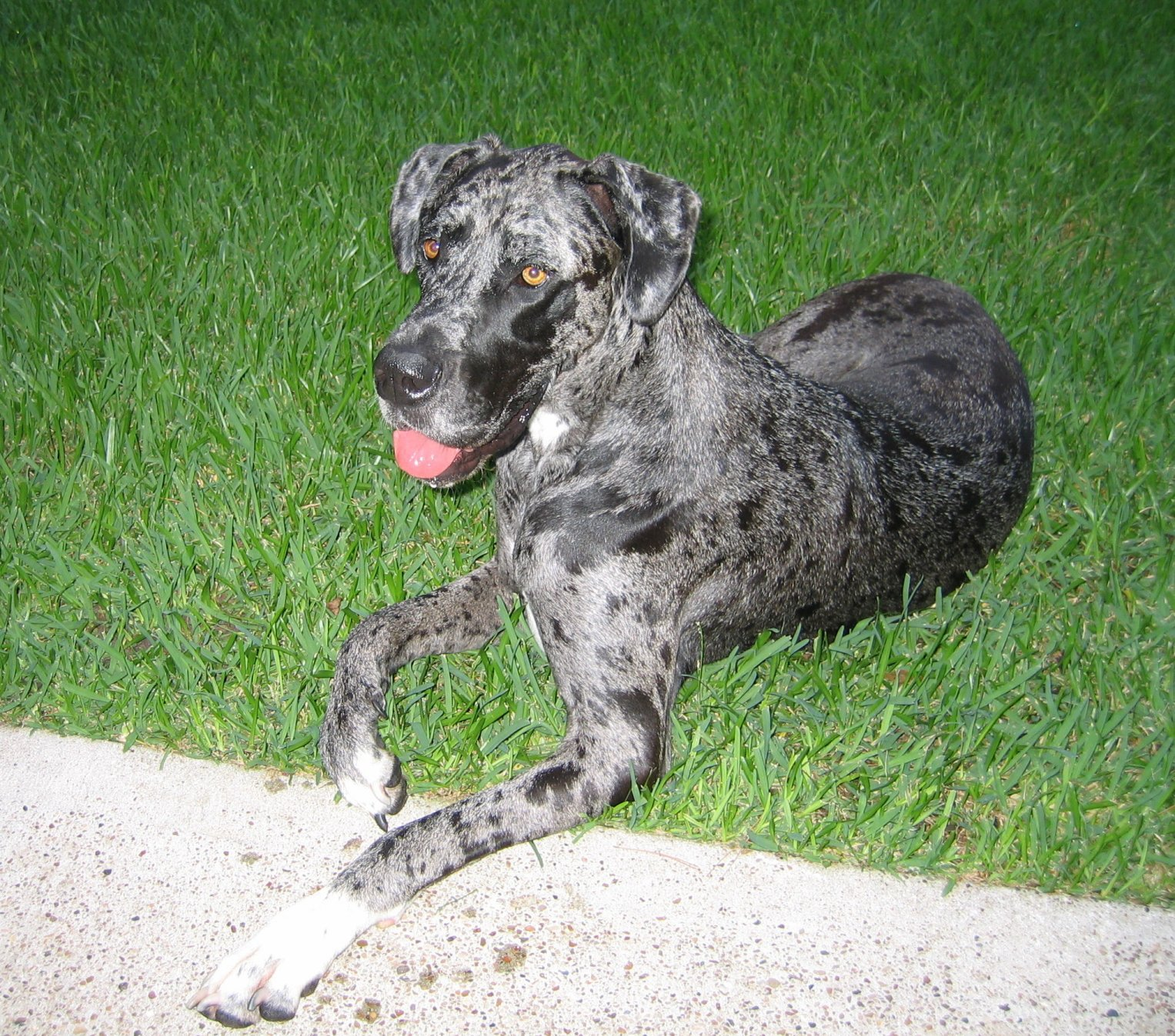 vala in grass